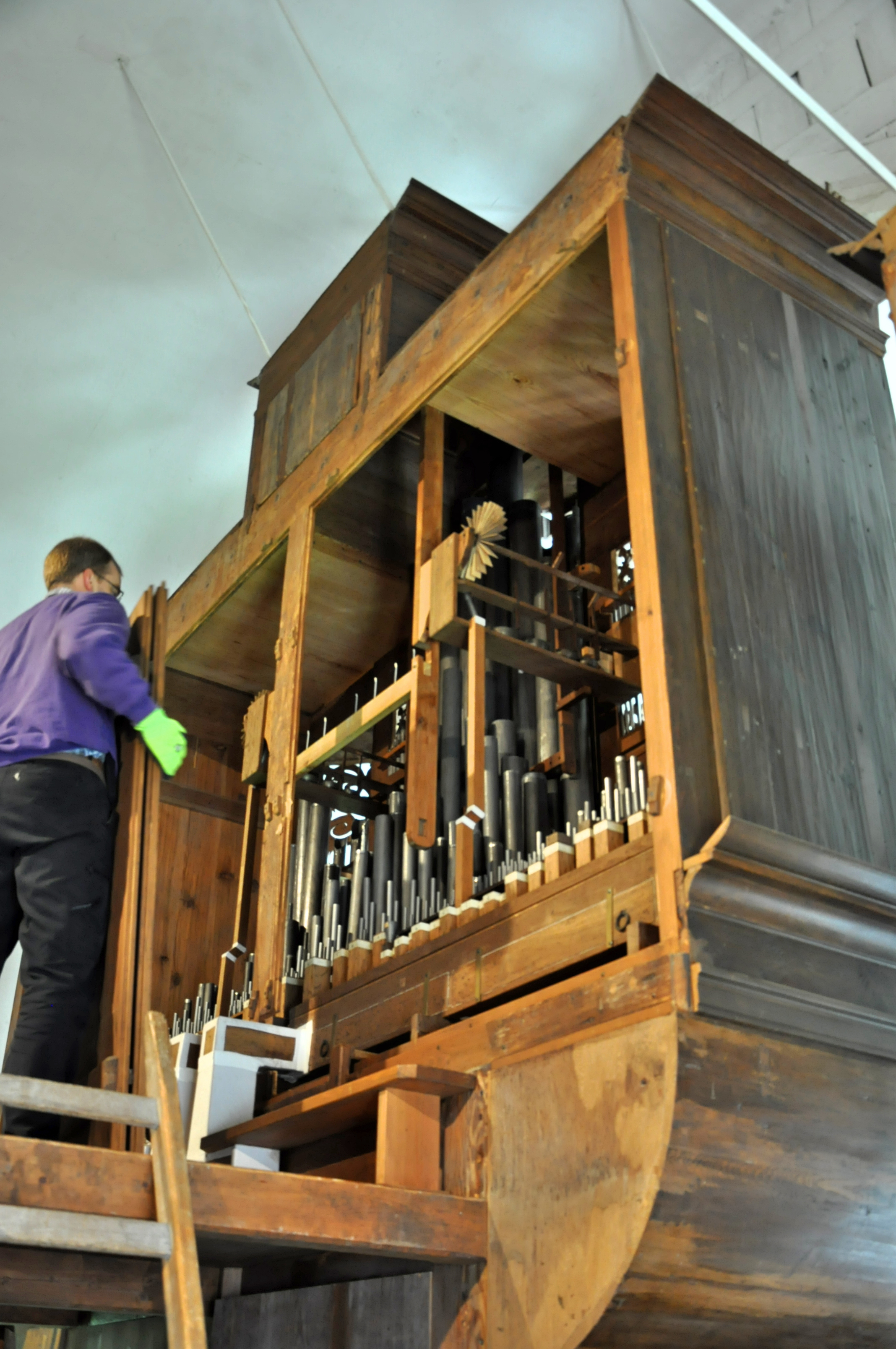 Orgel in Steinkirchen, Niedersachsen